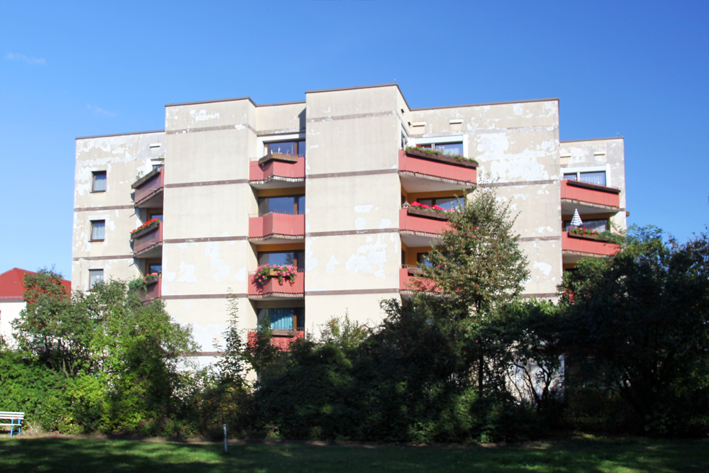 Zwölfeckhaus in Ottendorf, erstes fertiggestelltes Zwölfeckhaus überhaupt